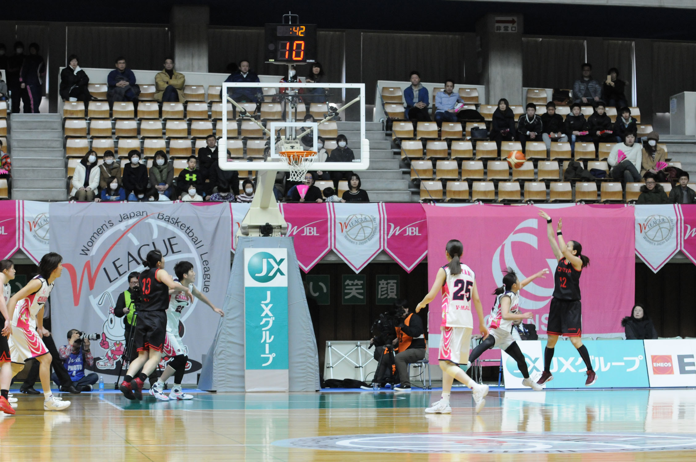 WJBL 16-17プレーオフセミファイナル、トヨタ対シャンソン。秋田県立体育館。